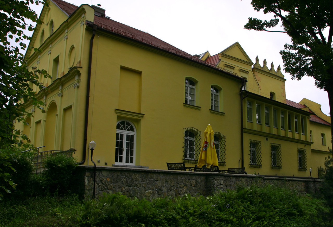 Rogów Opolski - wieś w Polsce, w powiecie opolskim.